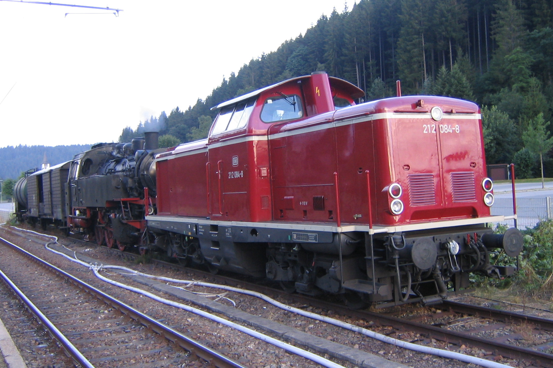 Die beiden Lokomotiven 64 419 und 212 084-8 in Titisee